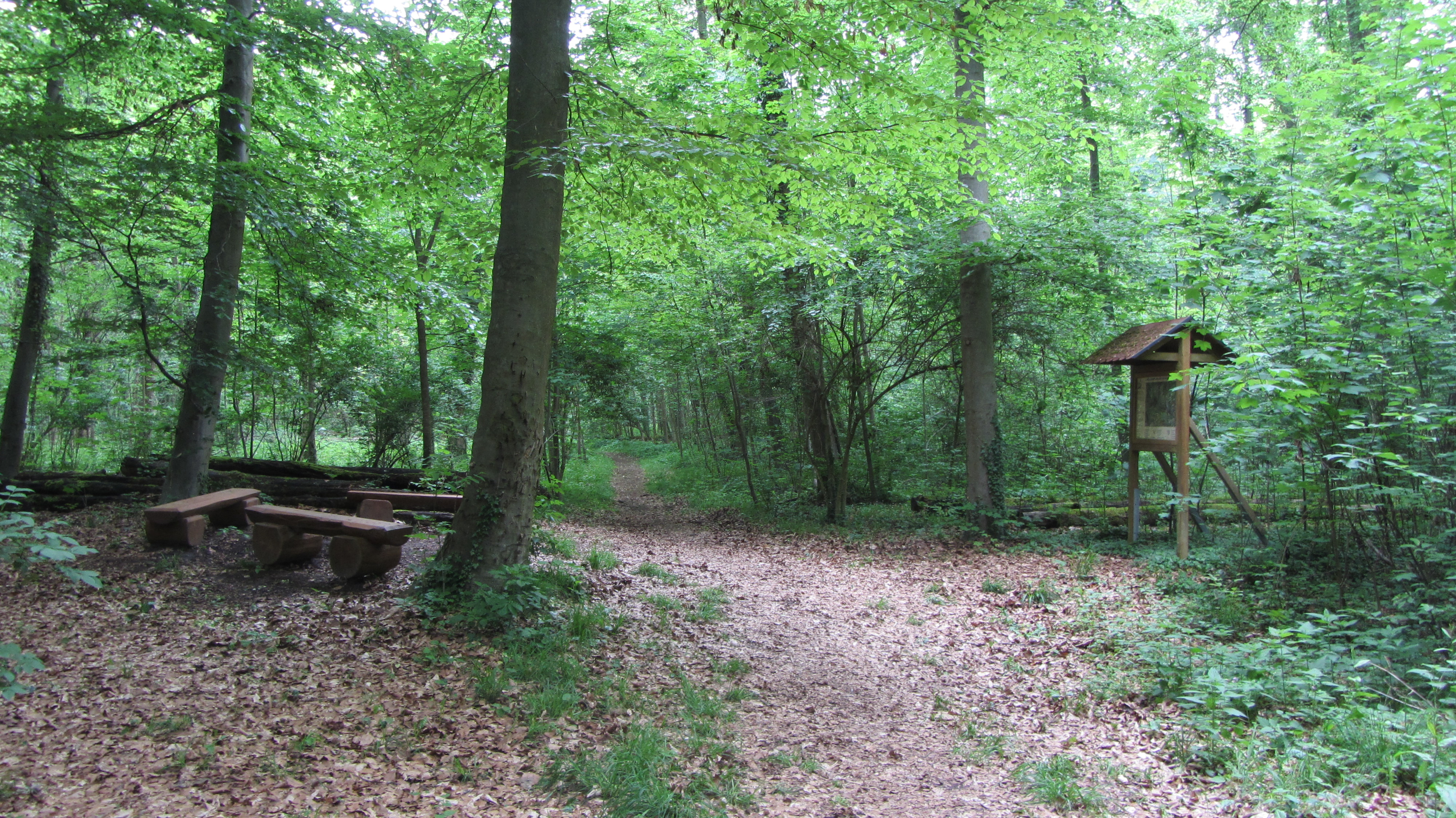 Lieu de repos Herrnsheimer Klauern